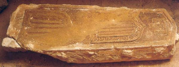 Lápida sepulcral del infante Don Alfonso en el Monasterio de Veruela. El infante Don Alfonso era el hijo primogénito de Jaime I el Conquistador, hasta su muerte, ocurrida en Calatayud en 1260. Es probable que los restos mortales del infante fueran llevados desde el Monasterio de Veruela hasta la Catedral de Valencia, donde hoy día se encontrarían en el sepulcro que se le atribuye en la Capilla de San Jaime de la Catedral de Valencia.